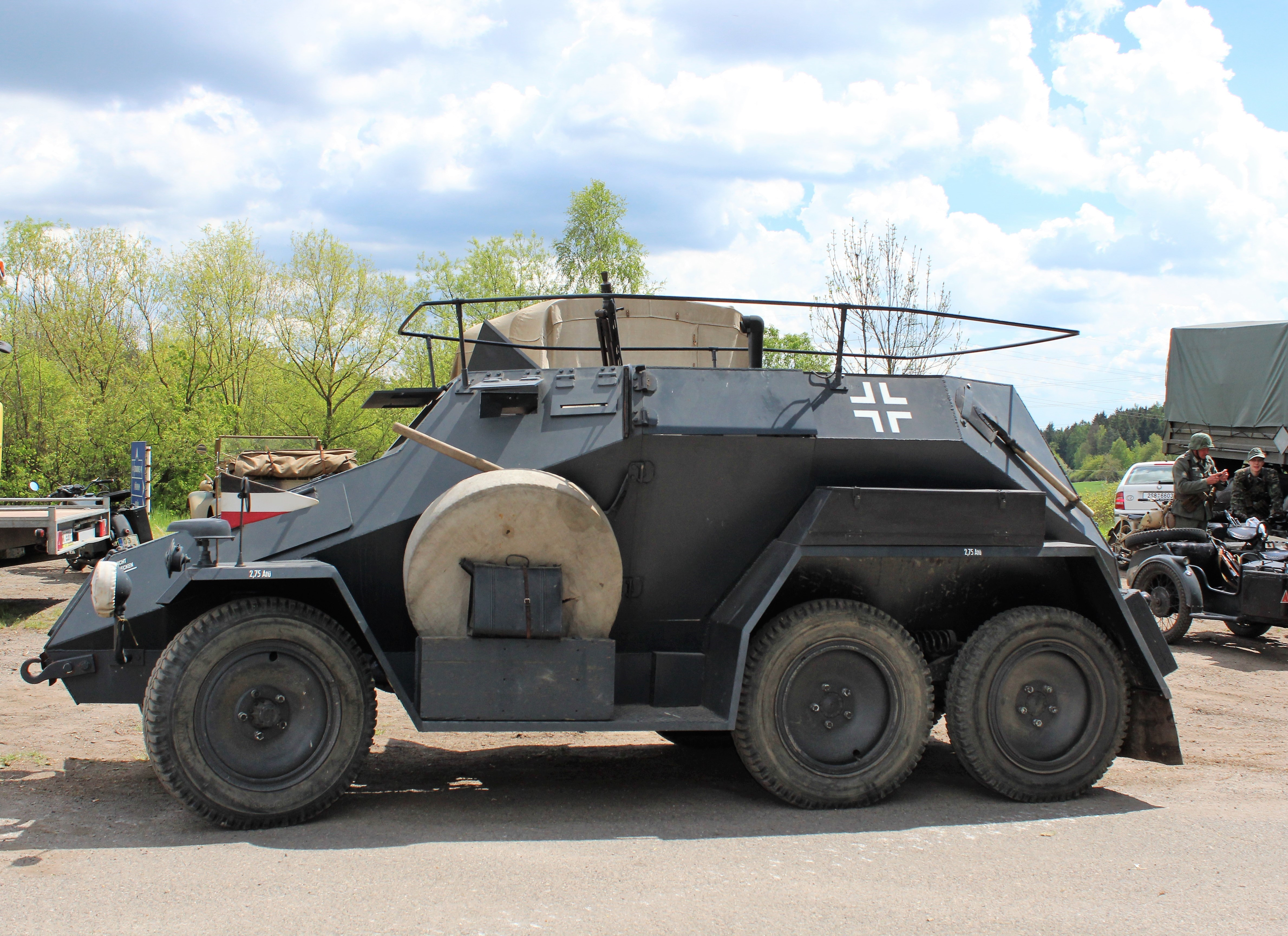 Slivice 1945 / 2017. Připomínka poslední bitvy 2. světové války v Evropě. Památník Vítězství (Slivice). Okres Příbram. Česká republika. Personality rights warningAlthough this work is freely licensed or in the public domain, the person(s) shown may have rights that legally restrict certain re-uses unless those depicted consent to such uses. In these cases, a model release or other evidence of consent could protect you from infringement claims.